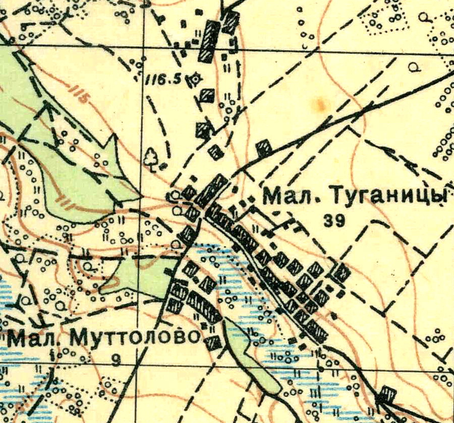 Топографическая карта Ленинградской области, квадрат О-35-24-Б-а (Переярово), деревня Малые Туганицы